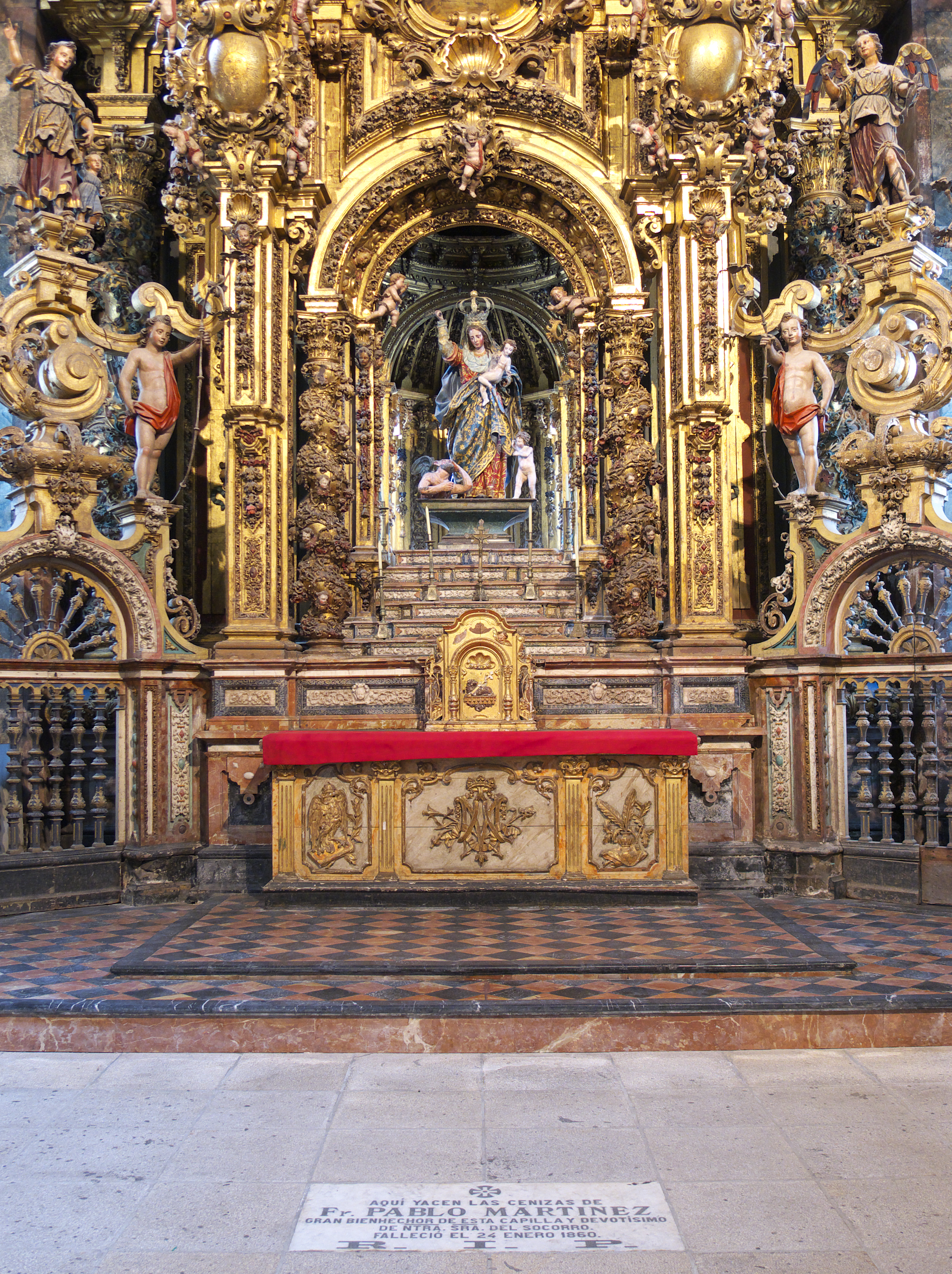 El retablo es de Manuel de Leis, siguiendo el proyecto de Fernando de Casas y Novoa. La imagen, atribuía a Mateo de Prado o Pedro Taboada.